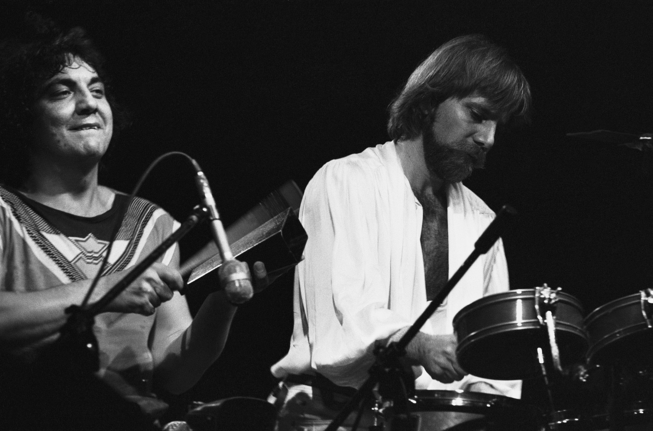 Il musicista Tony Esposito con Tullio de Piscopo durante un concerto dei primi anni '80